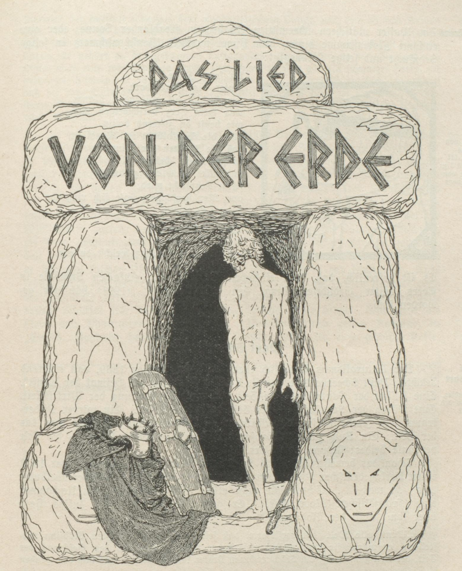 Fidus Illustration zu Das Lied von der Erde in Franz Evers Hohe Lieder 1896